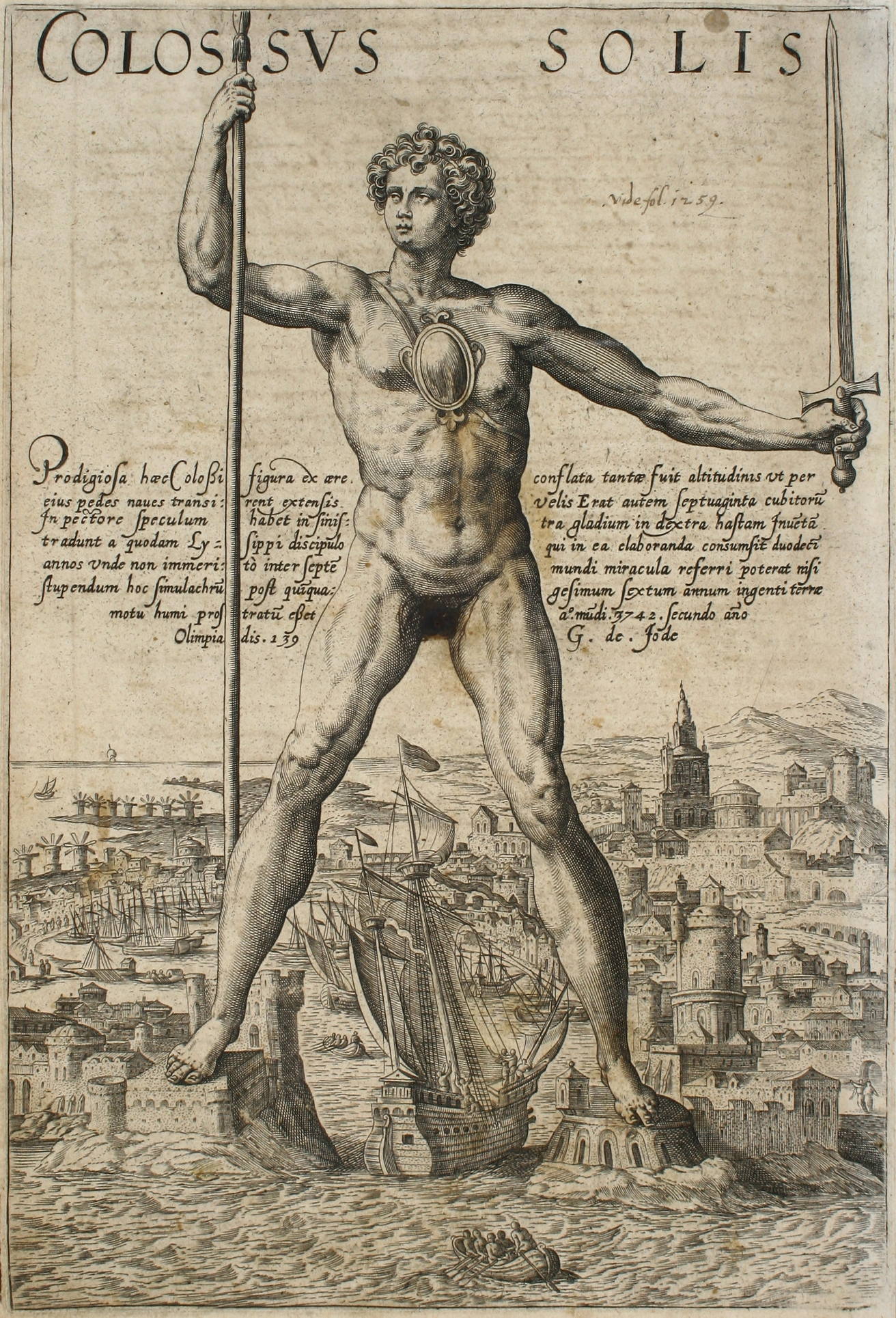 Colossus solis". Der spreizbeinige Koloss mit Speer in der rechten u. Schwert in der linken Hand über der Hafeneinfahrt, durch die ein Schiff fährt. Kupf. von G. de Jode, um 1580